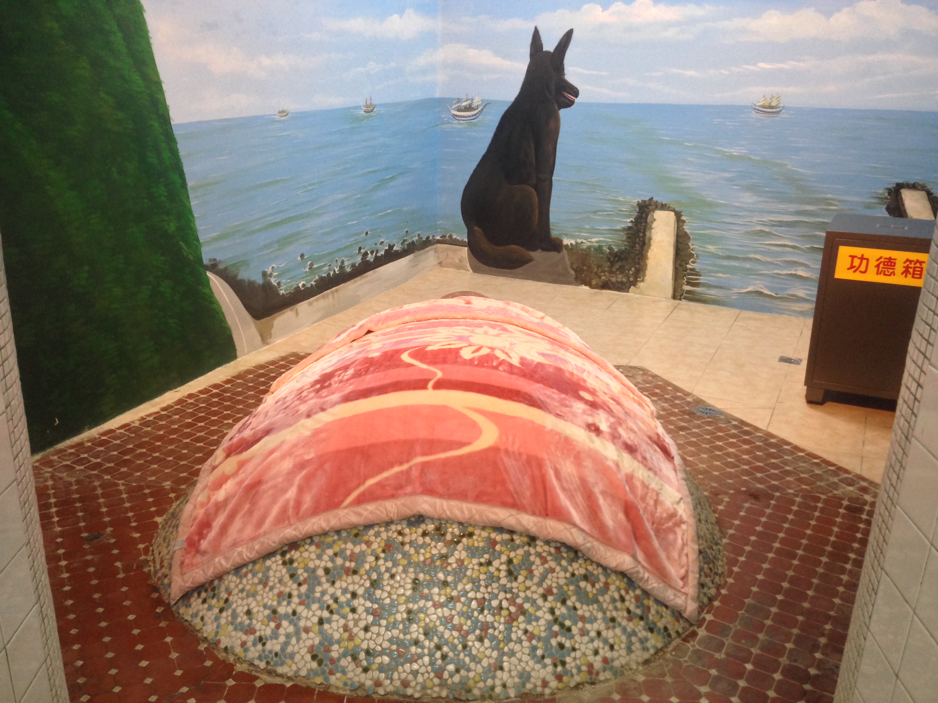 乾華十八王公祠地下室墳墓